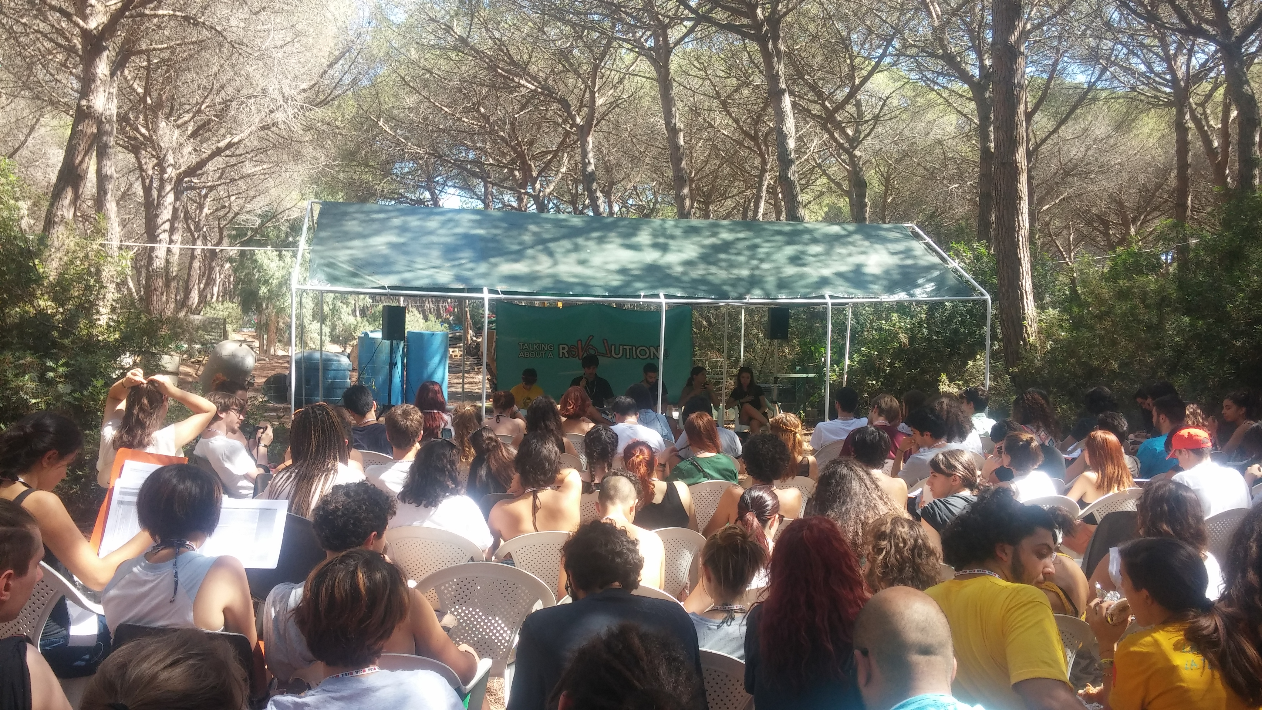 Assemblea Nazionale della Rete degli Studenti Medi, Marina di Montalto, 29 luglio 2017